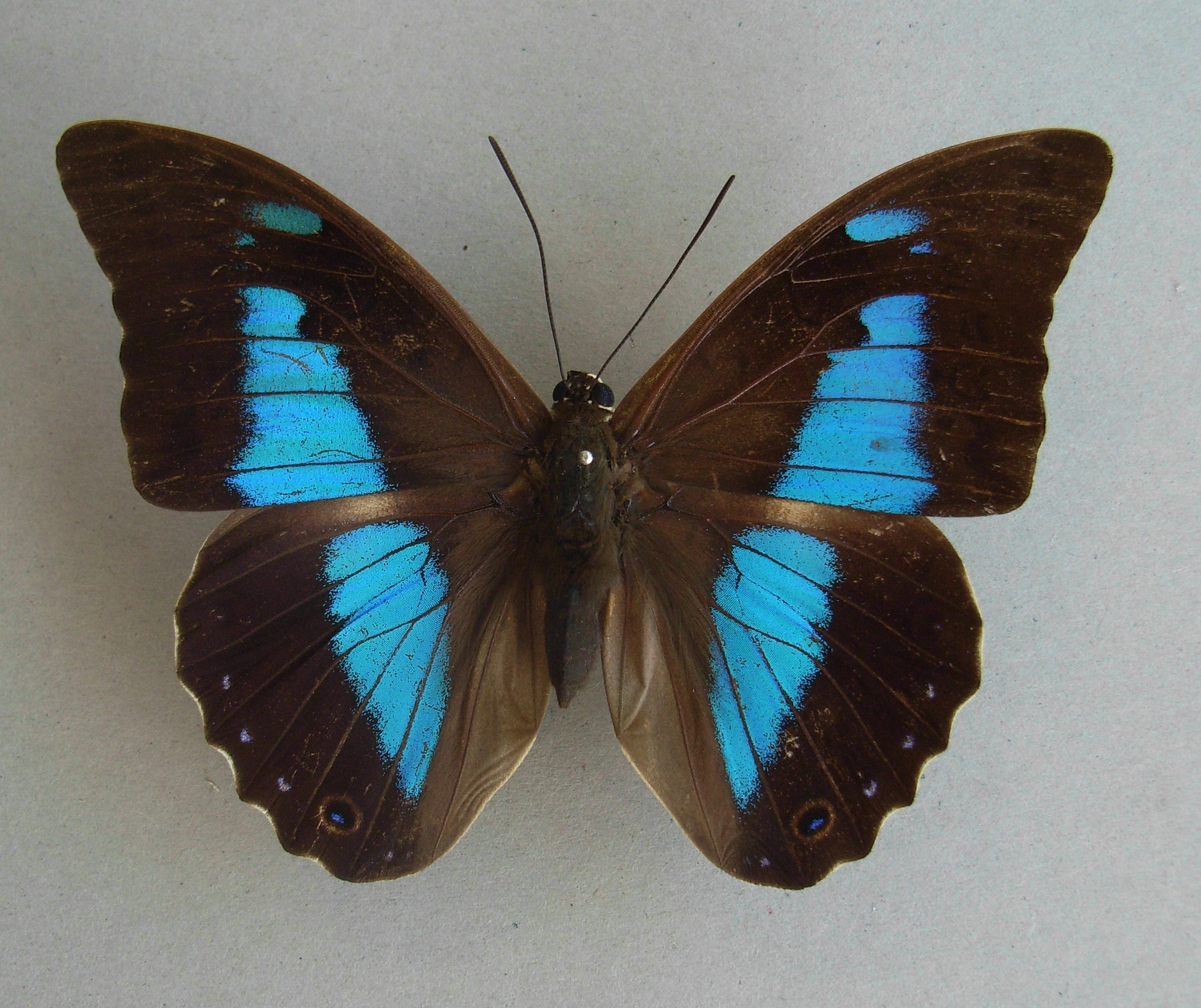 [Prepona laertes] (Hübner,[1811])Male?